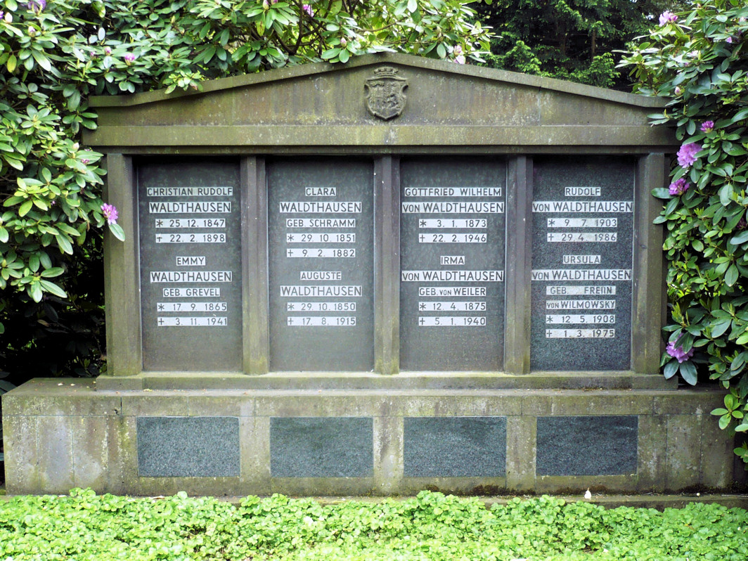 Ein altes Waldthausen-Grabmal auf dem Friedhof Bredeney in Essen